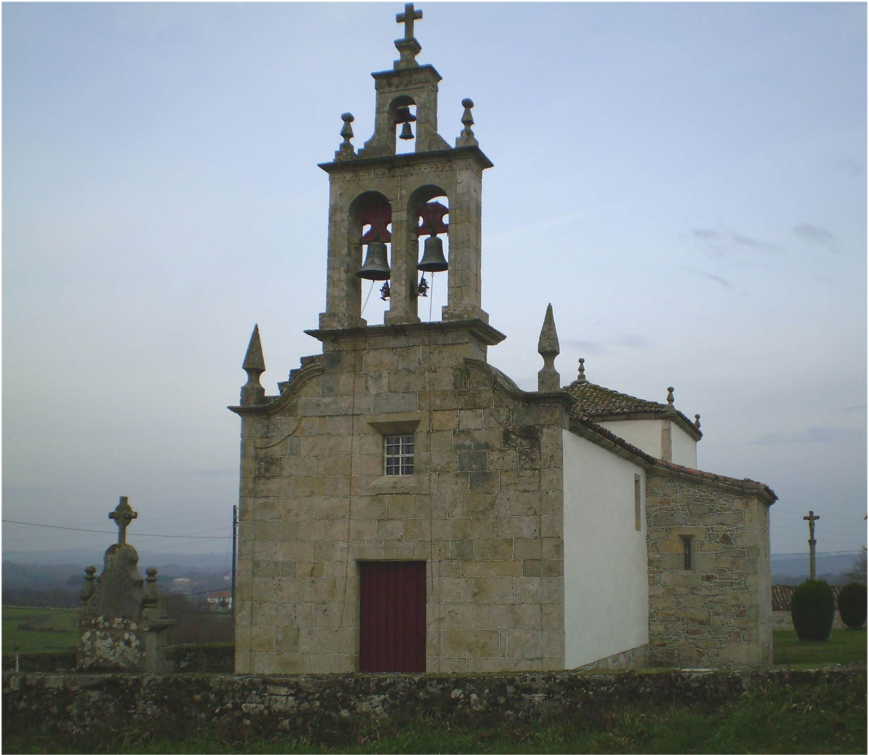 Igrexa de Senande (Antas de Ulla)